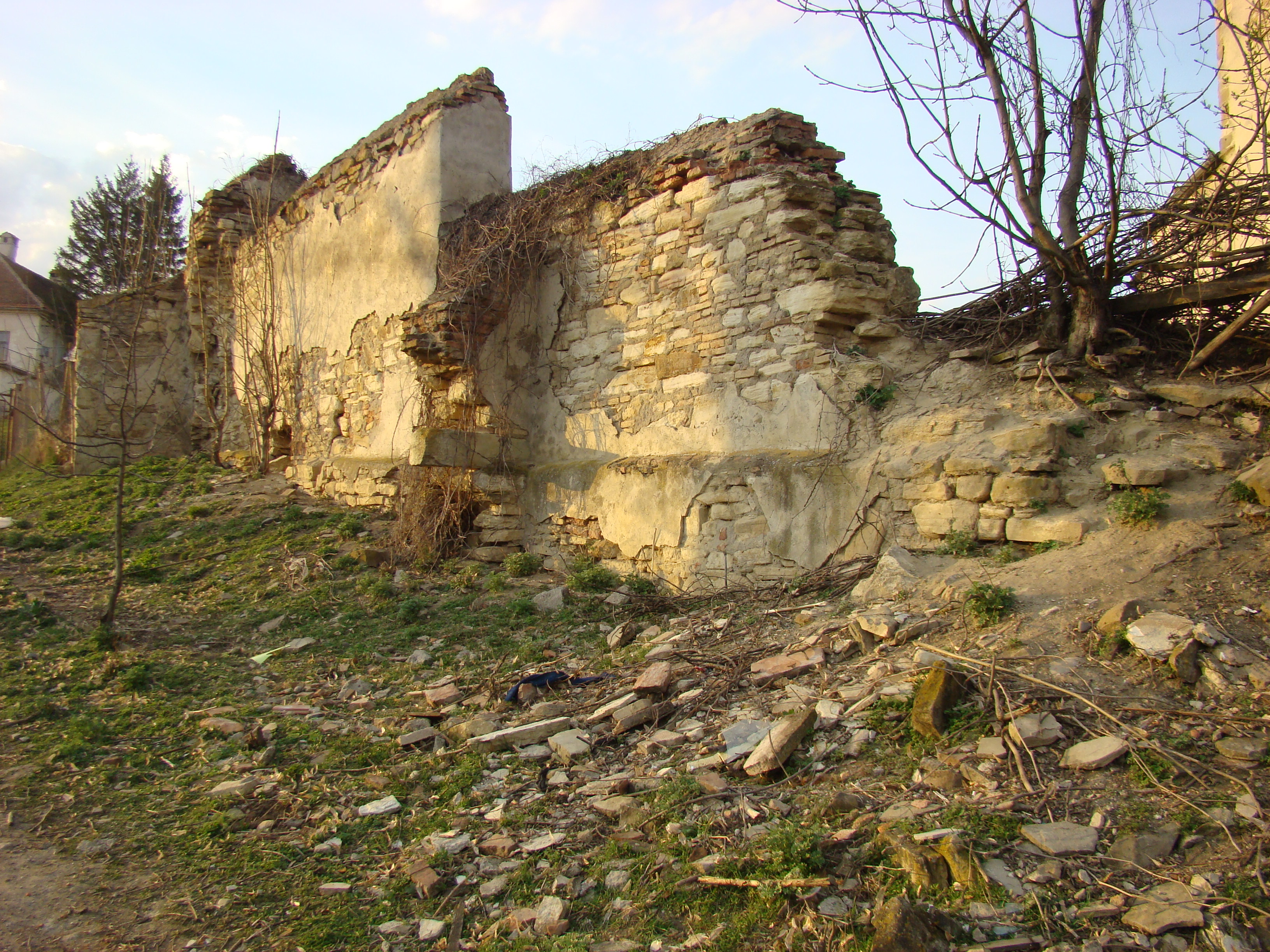 Biserica evanghelică, sat Lechința; comuna Lechința, județul Bistrița-Năsăud 03